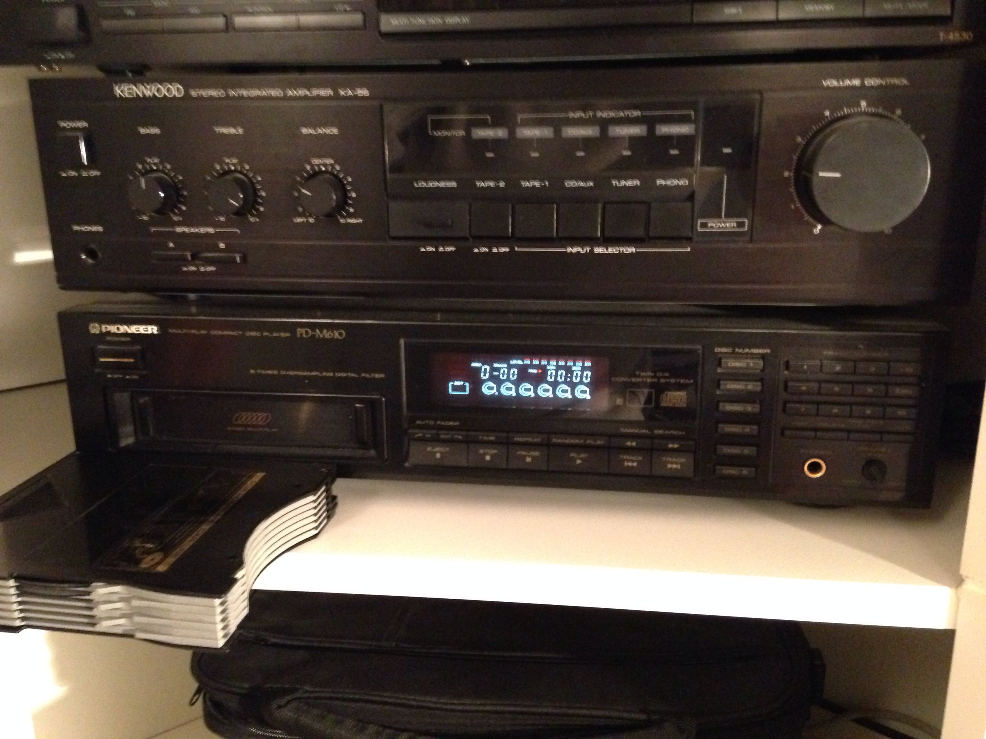 6-Fach CD Wechsler